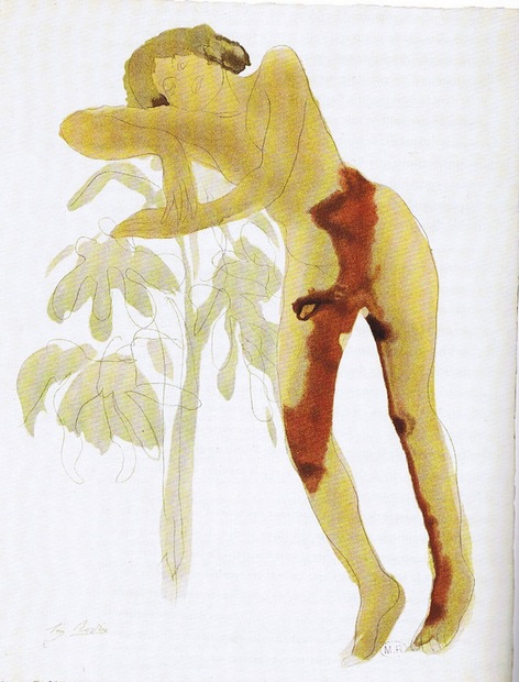 Illustration d'Auguste Rodin (1840-1917), pour Le Jardin des supplices d'Octave Mirbeau (1848-1917)